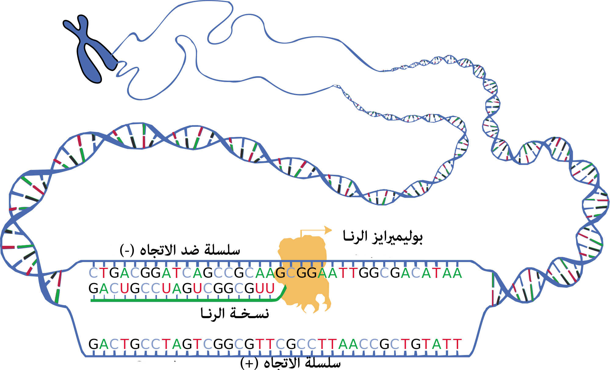 عملية نسخ الدنا، وتوضيخ سلستي الاتجاه وضد الاتجاه.